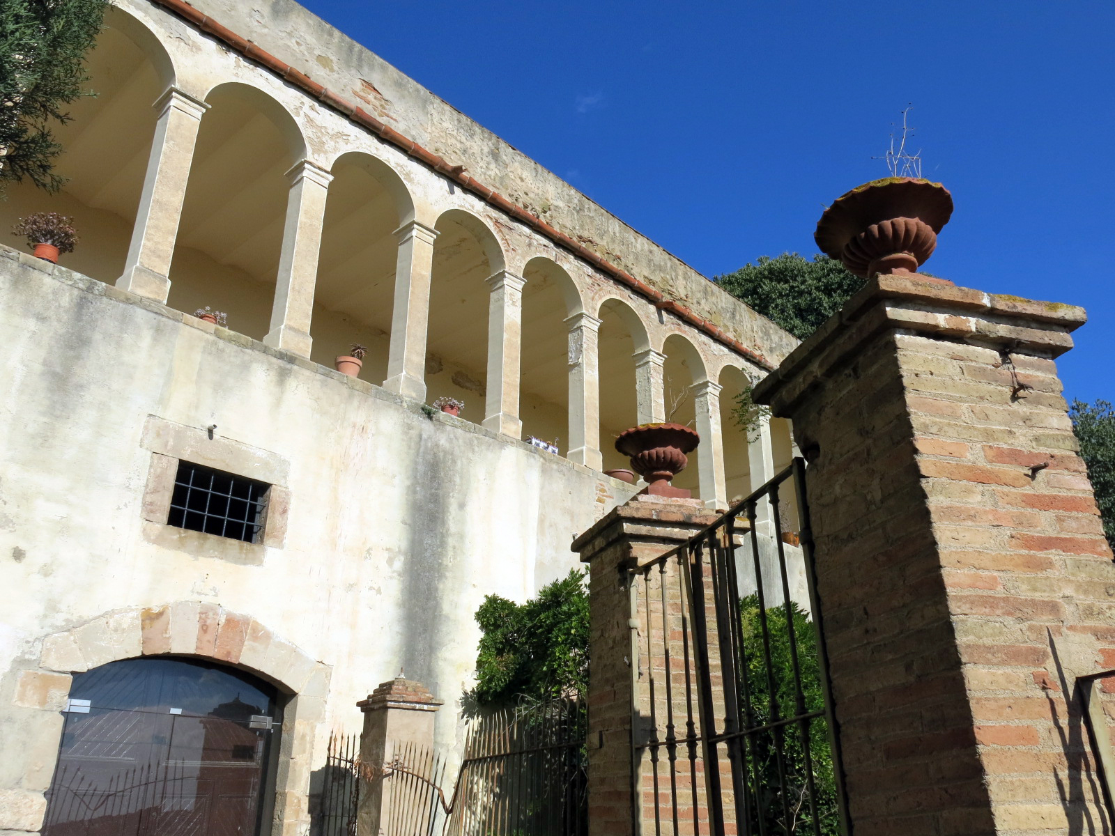 Monestir de Sant Jeroni de la Murtra (Badalona)